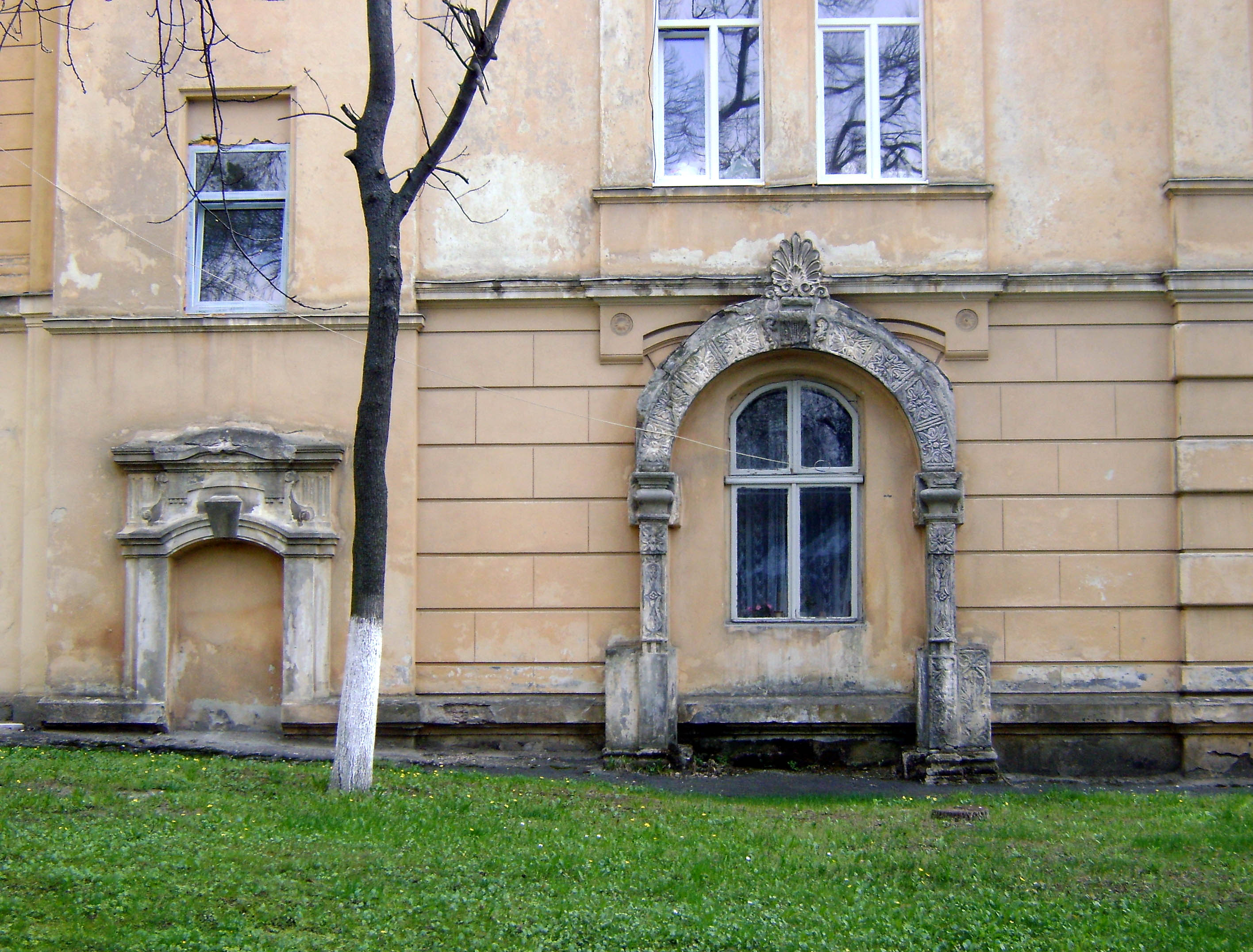 Кам'яні портали у стіні бібліотеки Дідушицьких у Львові. Вулиця Лисенка 17.